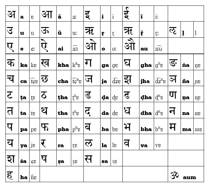 Sanskrit in Devanagari, mit IPA